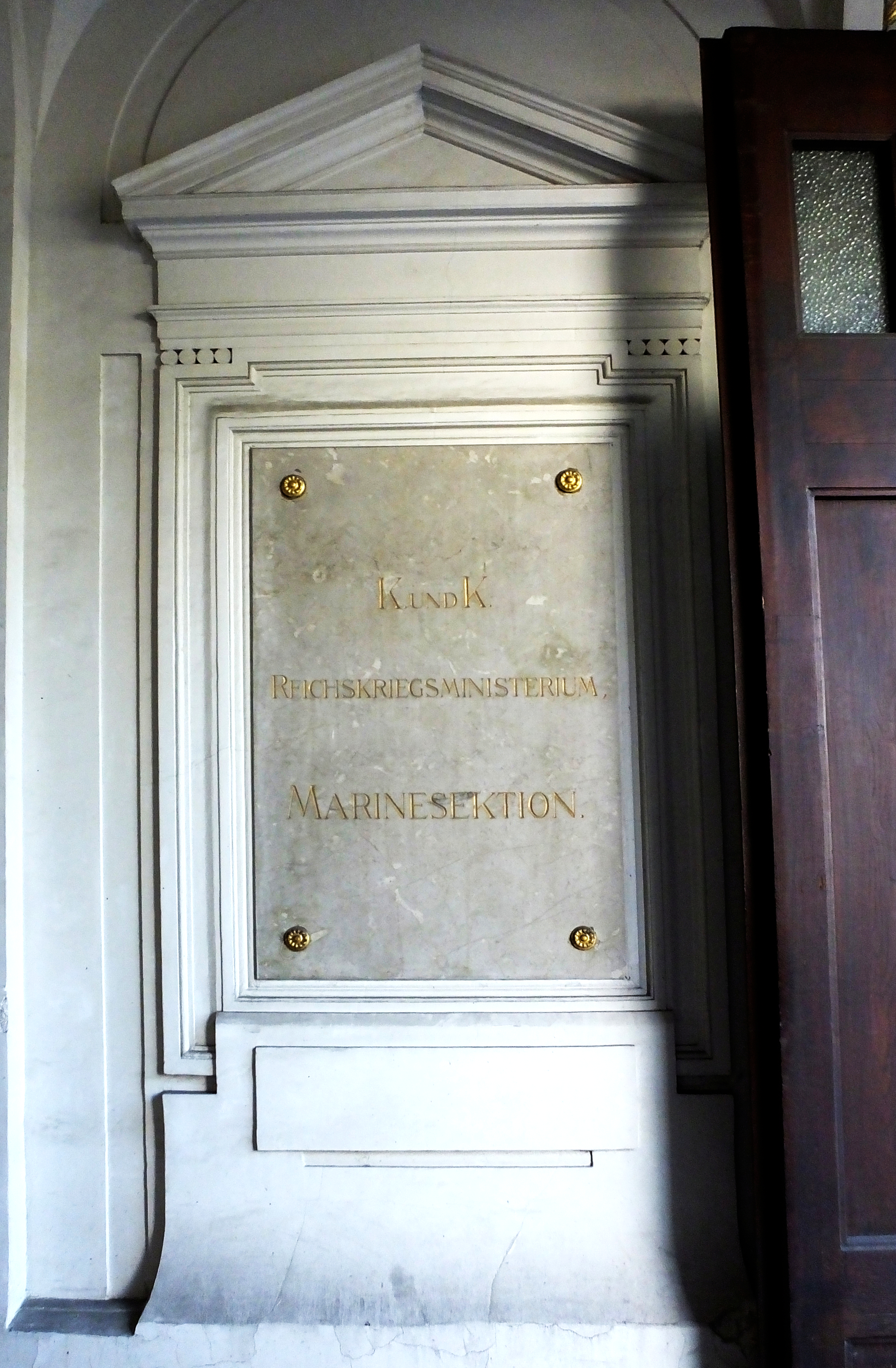 Dawny budynek marynarki wojennej austro-węgierskiego ministerstwa wojny w Wiedniu. Obecnie jeden z budynków Ministerstwa Rolnictwa, Leśnictwa, Środowiska i Gospodarki Wodnej